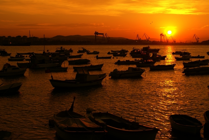 Pendik sabahi